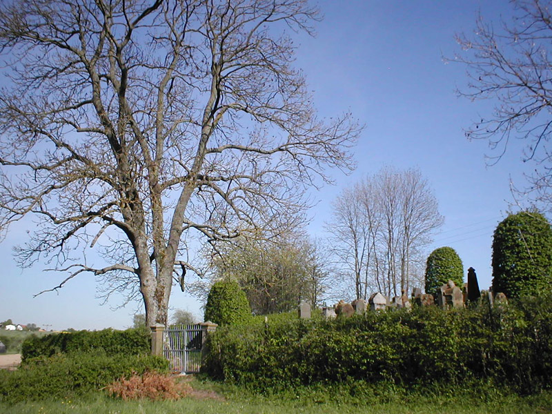 Jüdischer Friedhof in Kirchardt-Berwangen